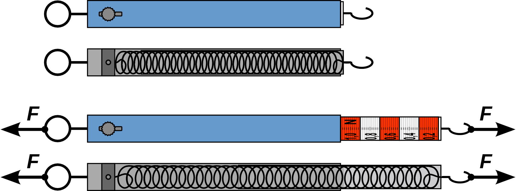 fortomezurilo